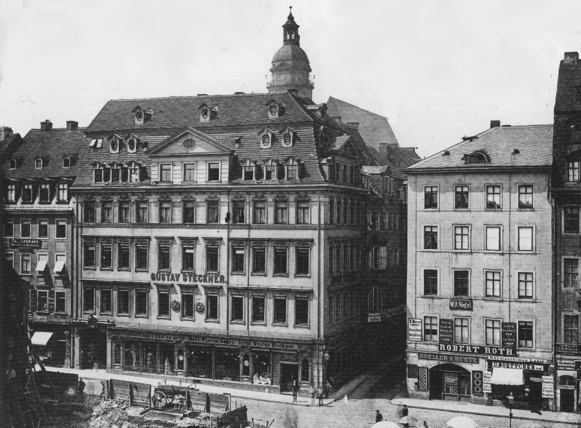 Das Geschäftshaus Gustav Steckner (Steckner-Passage) in der Petersstraße 2 direkt am Markt ist mit dem Thomaskirchhof verbunden und ist eins der frühesten, 1875 von O. Jummel entworfenen Einkaufspassagen der Stadt. Das mehrfach umgebaute Haus brannte 1943 aus. Heute befindet sich dort eine Grünanlage.